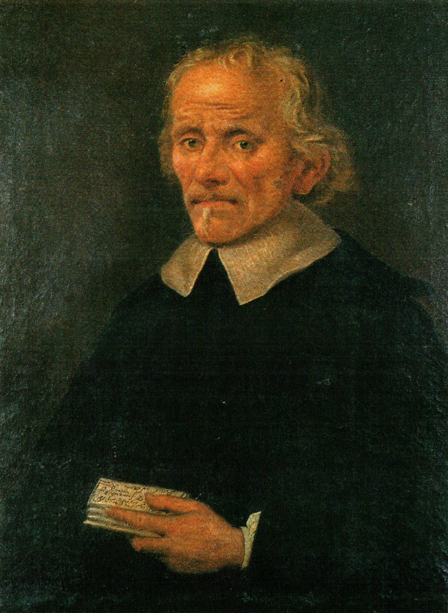 Dipinto settecentesco dell'esploratore Francesco Negri